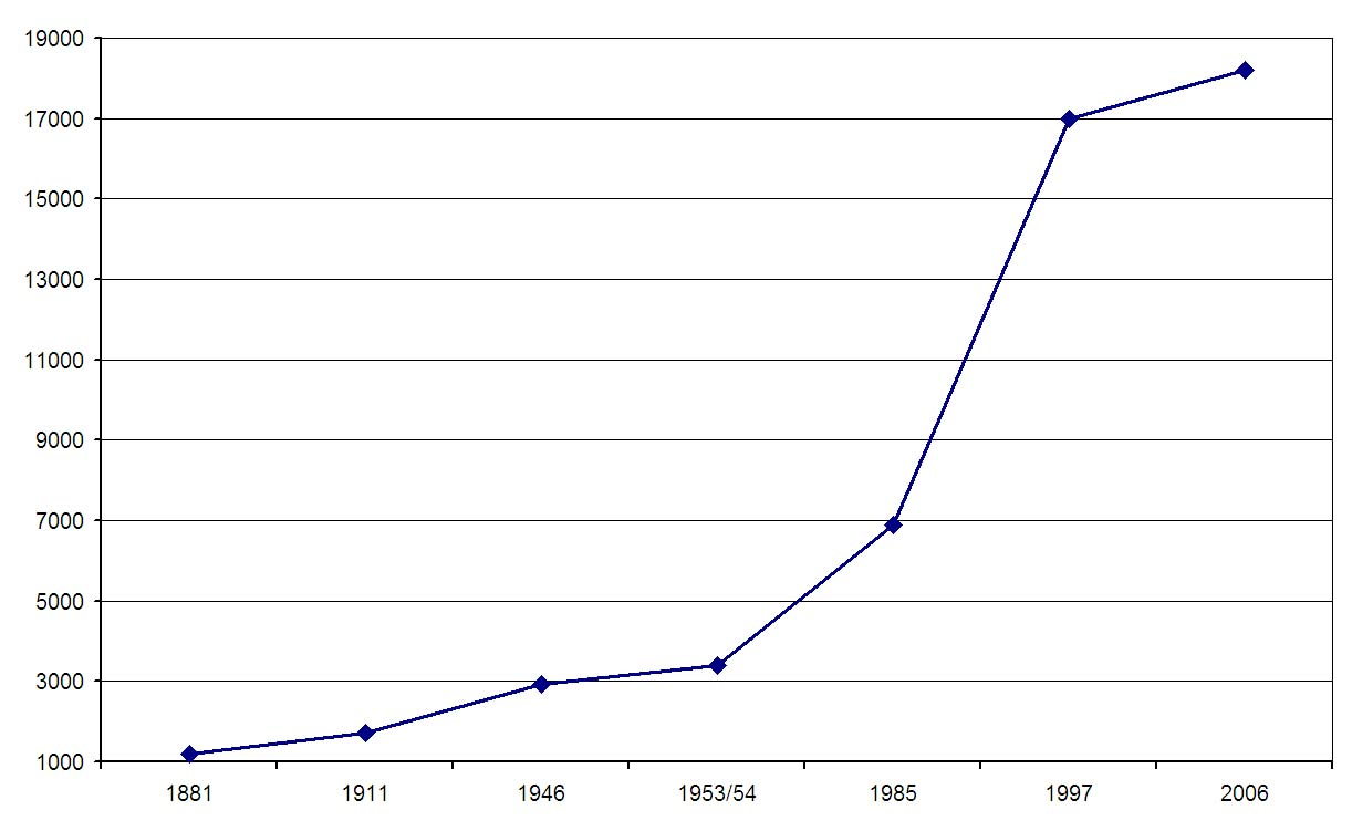 Einwohnerentwicklung Girne, nach Melamid 1956 und Girne